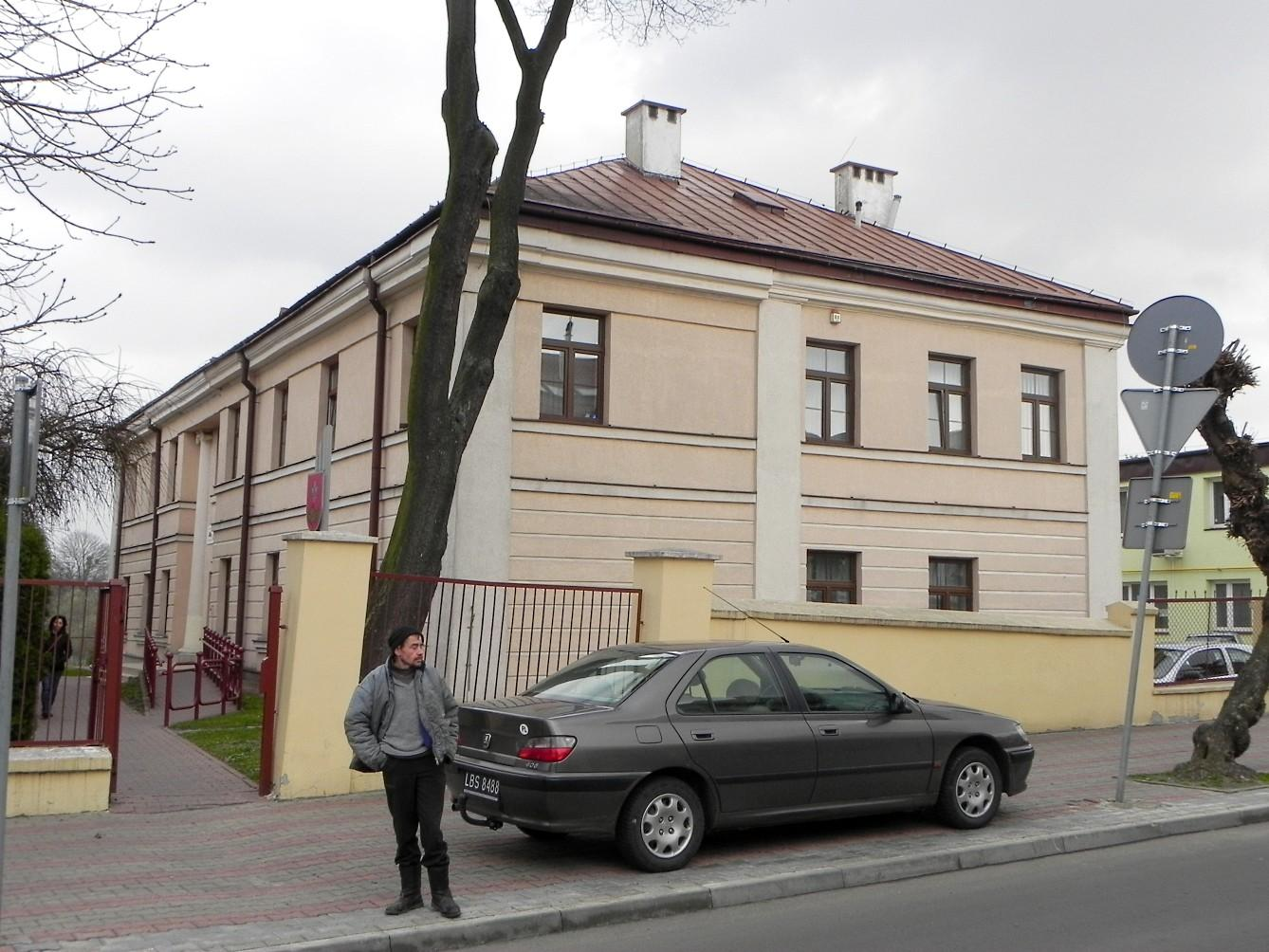 Ulica Mostowa 4. Obecnie siedziba Urzędu Pracy.